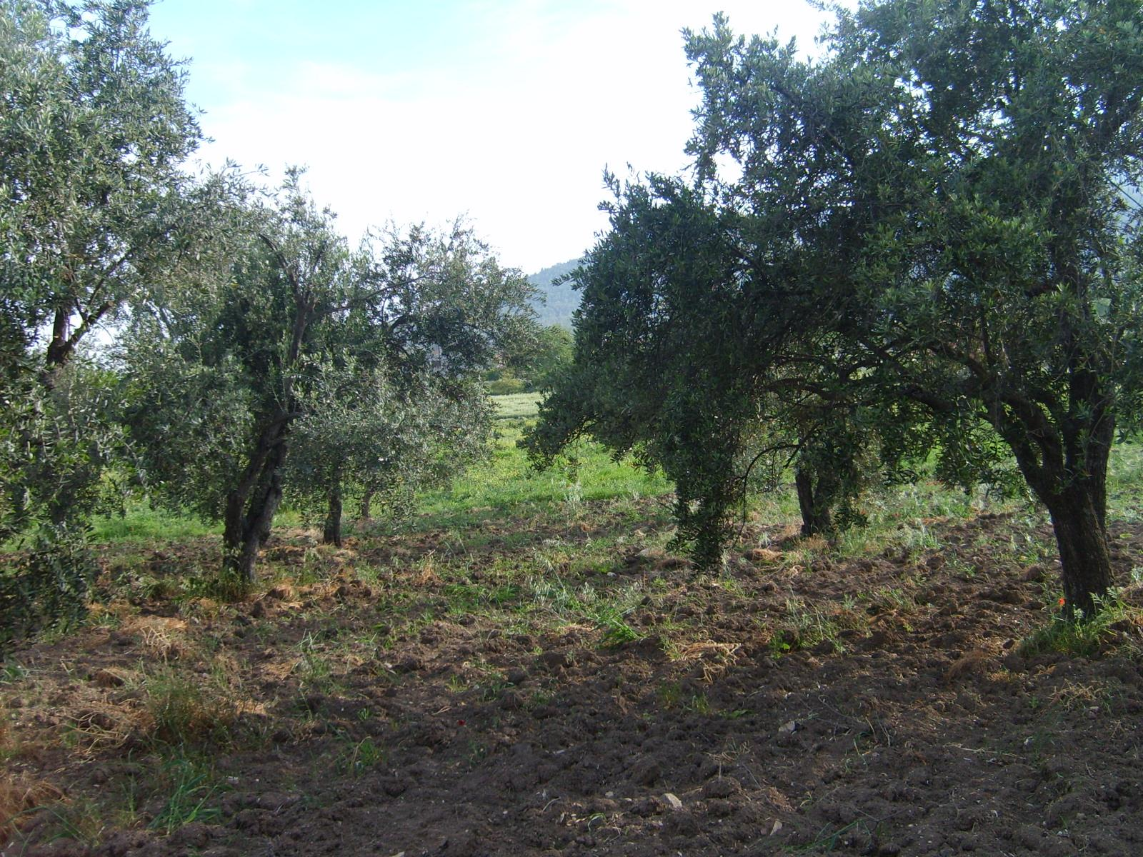 Kullanıcı tarafından çekilmiştir (Nisan-Mayıs 2007)